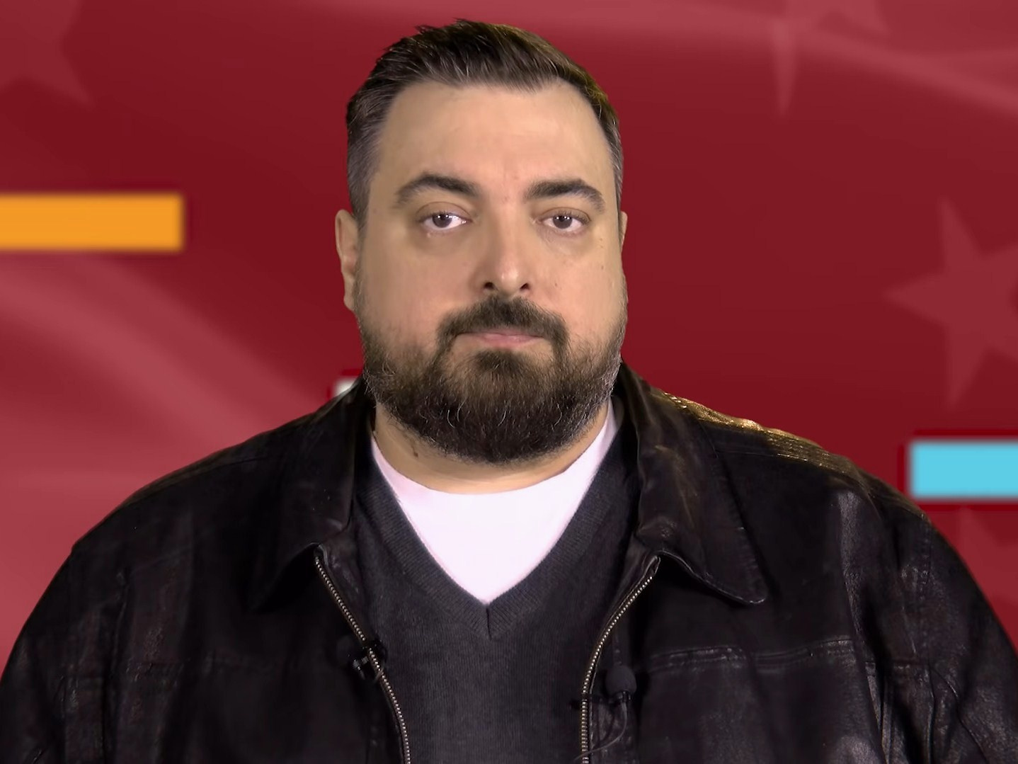 Tomasz Sekielski, dziennikarz i pisarz.